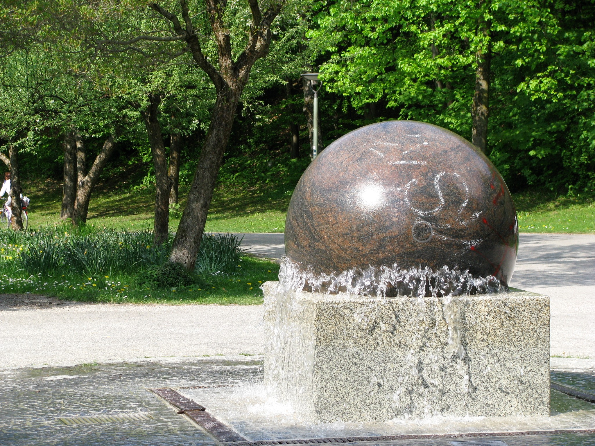 Westpark München, Kugelbrunnen von Christian Tobin (noch als Christian Mayer) am Südost-Eingang